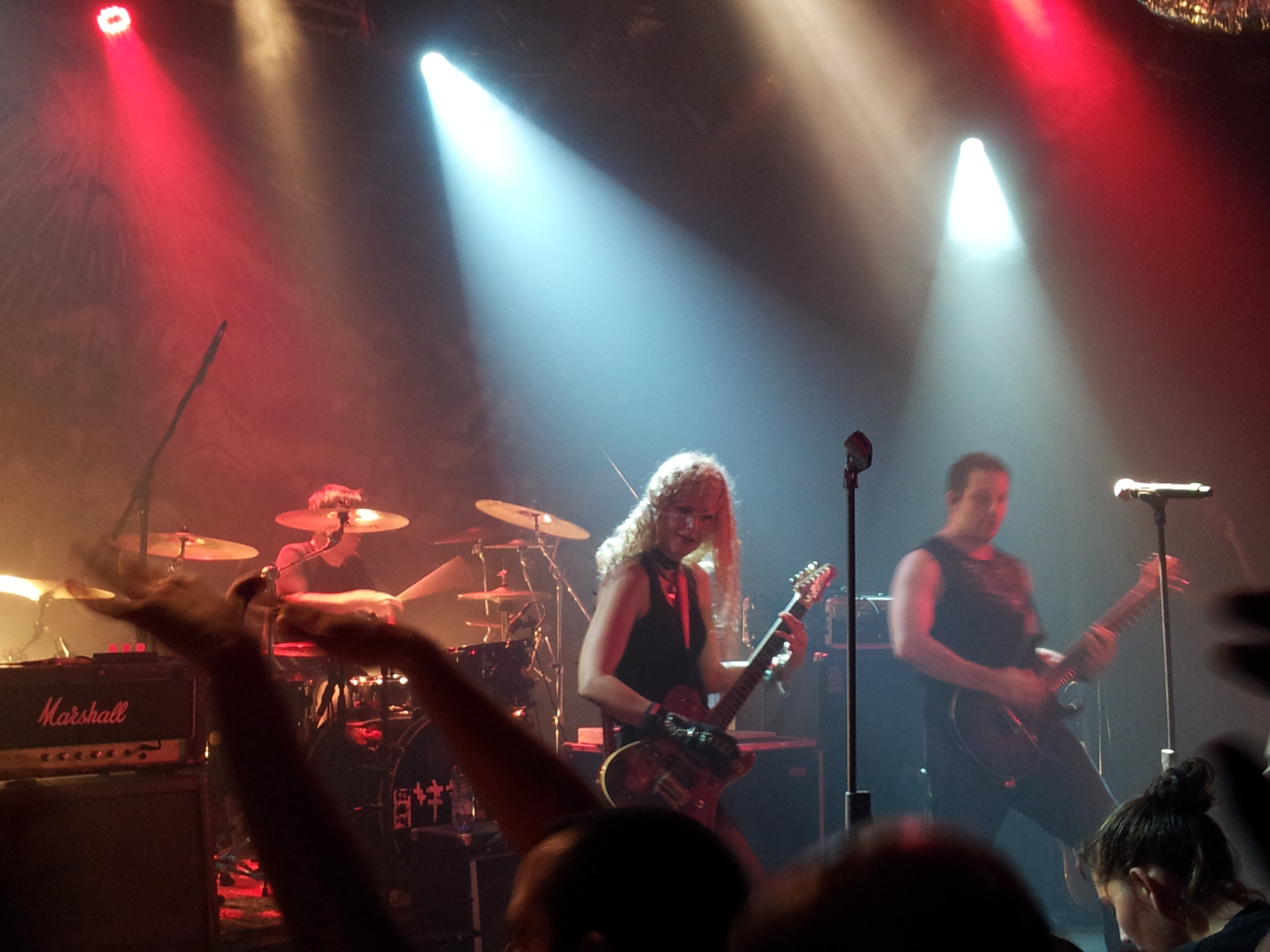 היהודים בהופעה ברדינג 3, 17 בספטמבר 2012